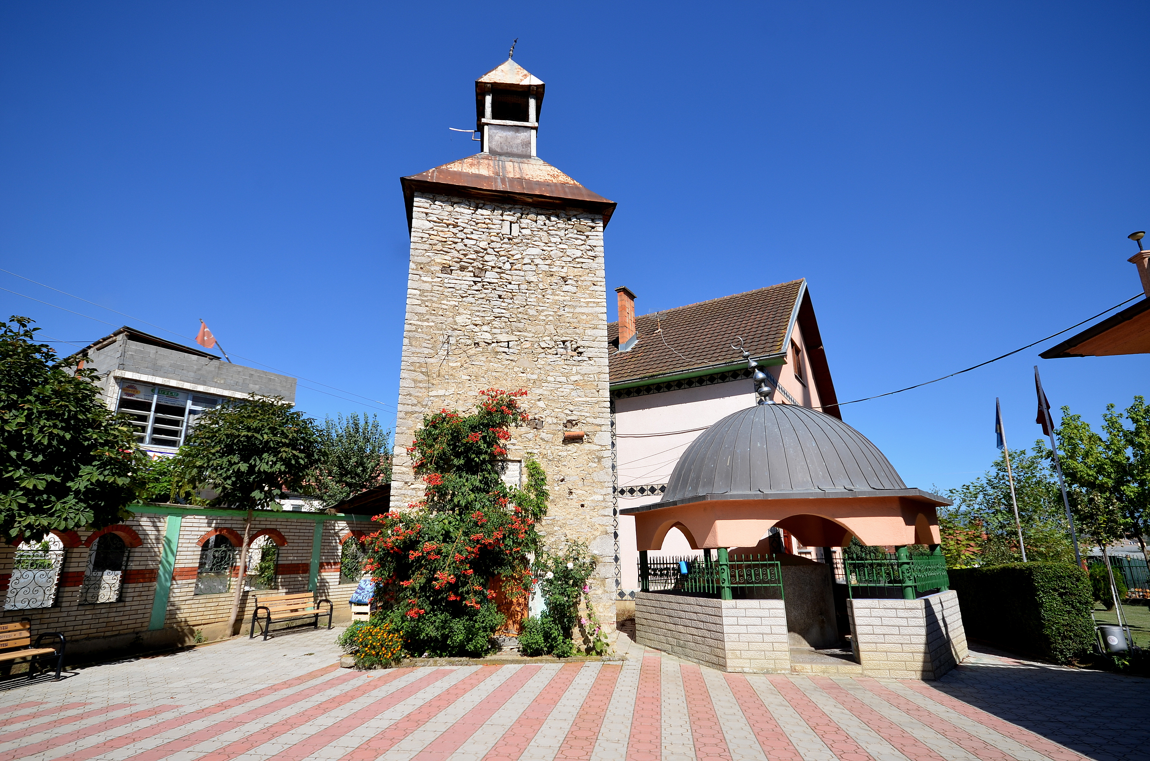 Sahat Kulla E Mahmud Pashës